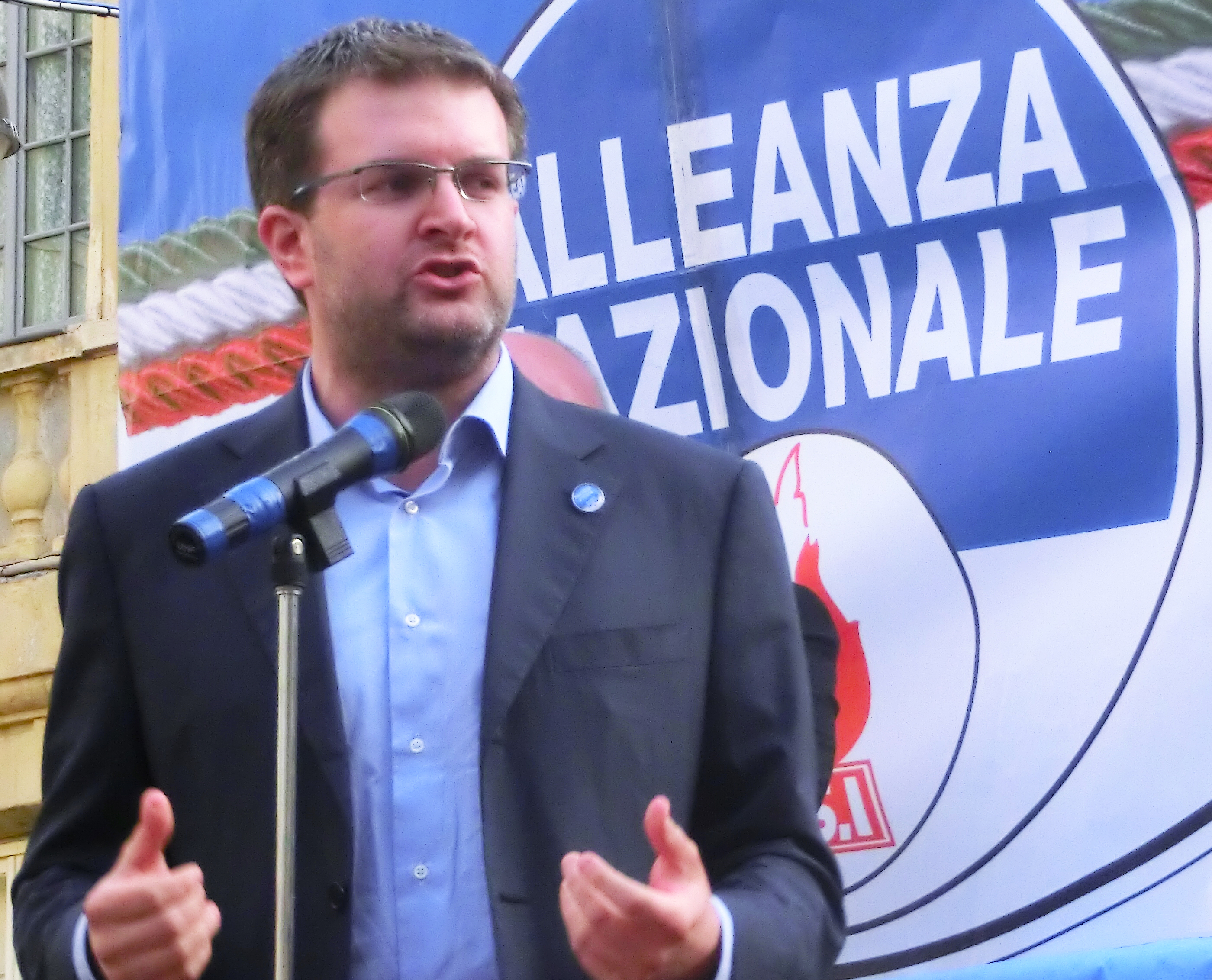 Carlo Fidanza a Sanremo per la campagna elettorale per le Elezioni europee del 2014 (Italia) e comunali